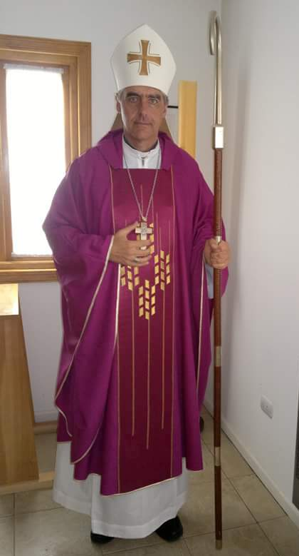 Monseñor Miguel Angel